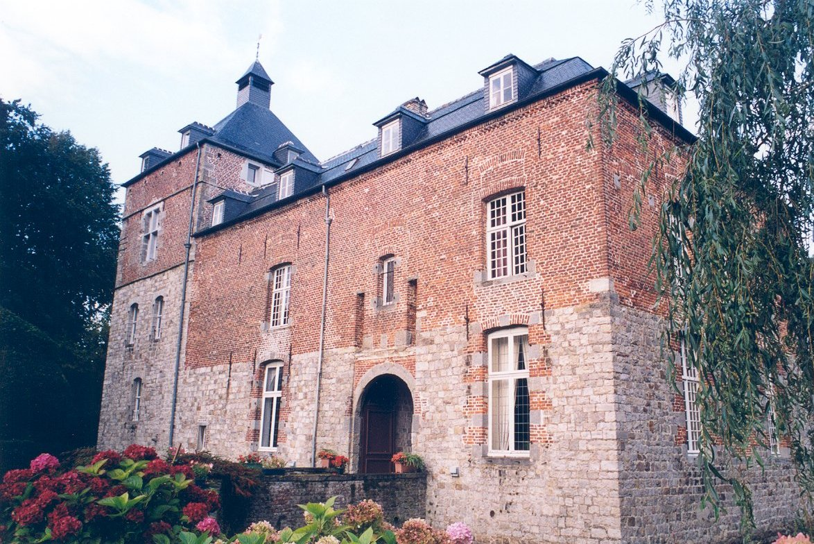 Château d'Audignies (Inscrit) .